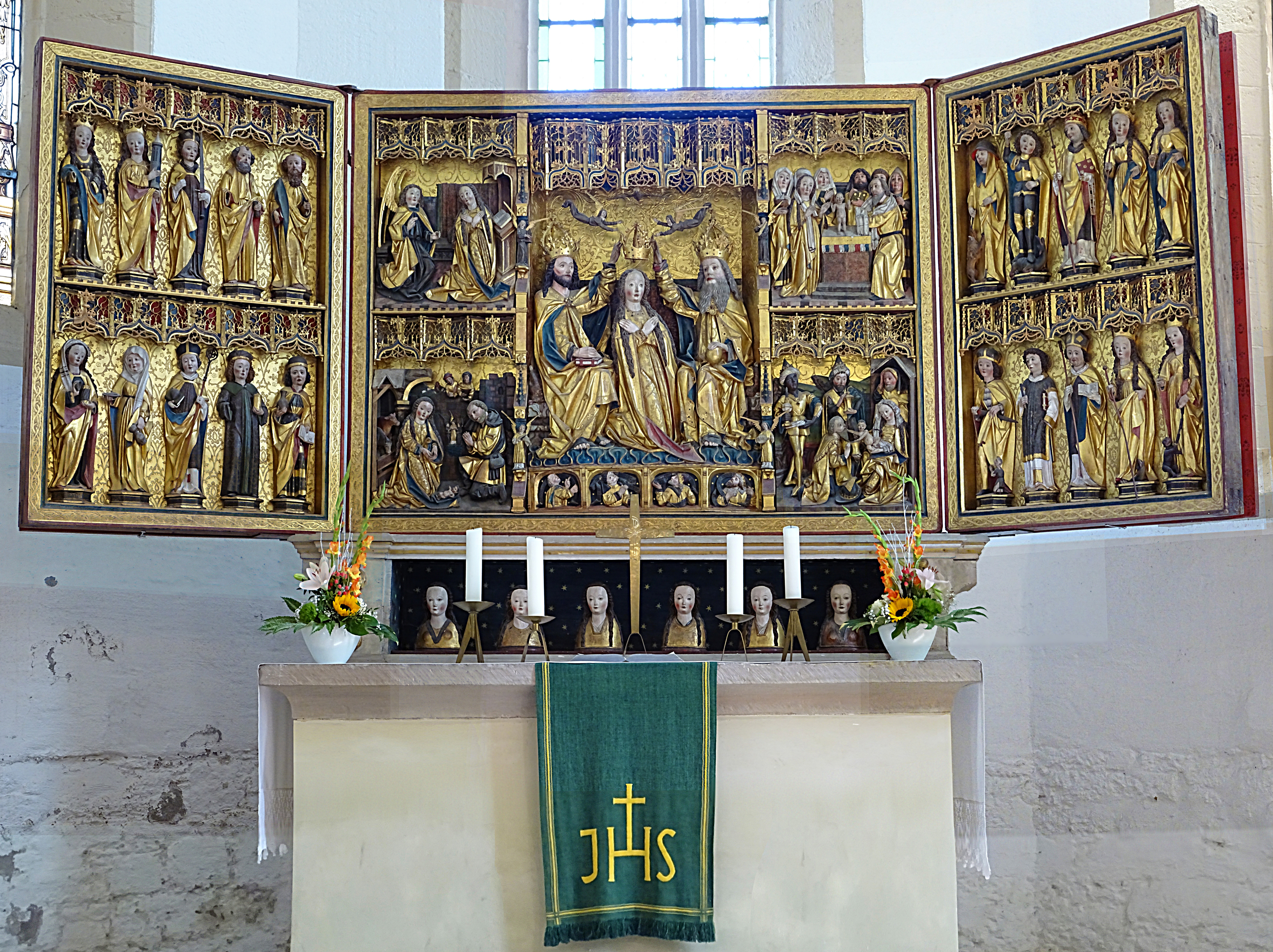 fünfteiliger spätgotischer Schnitzaltar aus dem 15. Jahrhundert in der Bonifatiuskirche (Sömmerda)